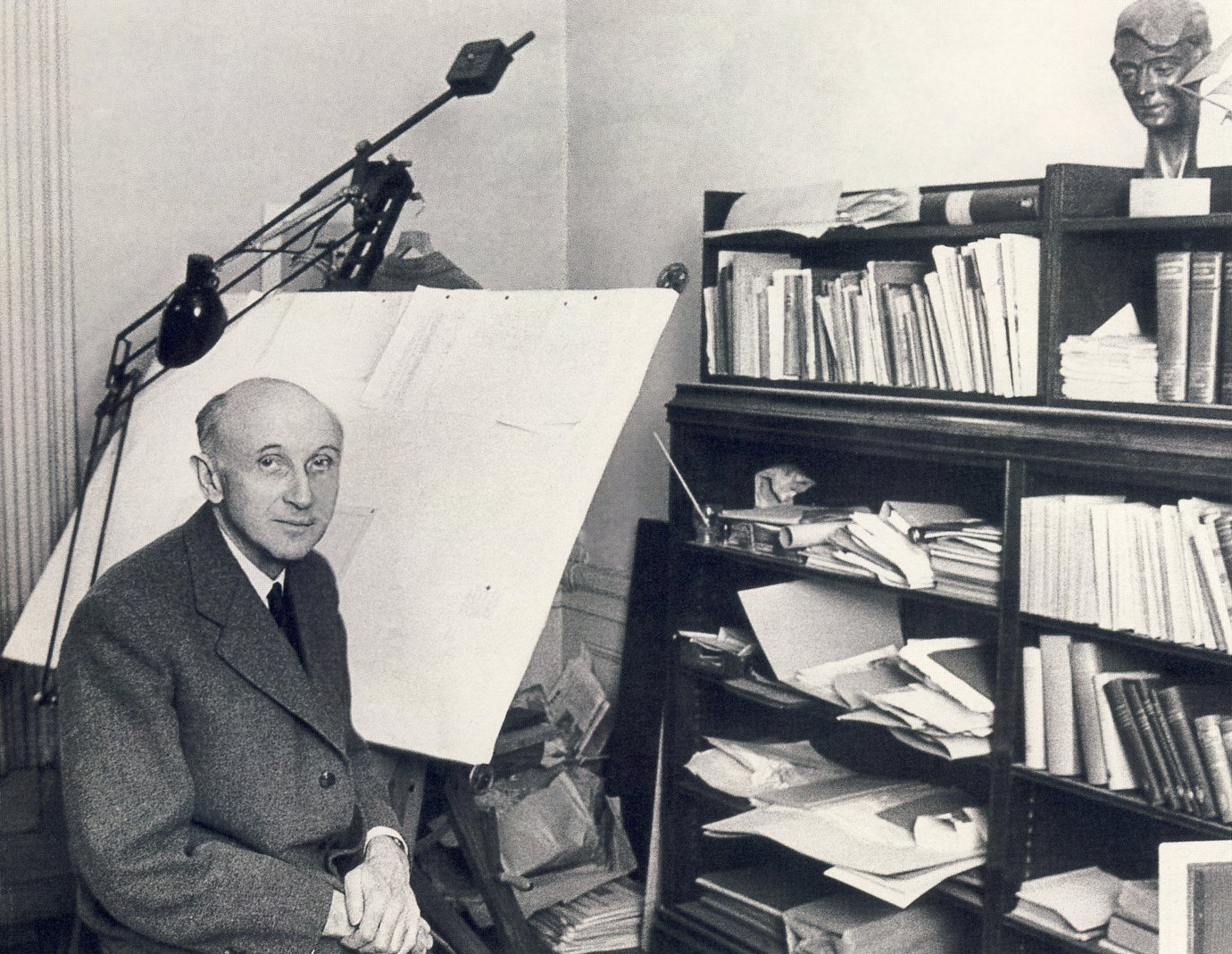 Baltzar von Platen på sitt kontor 1960